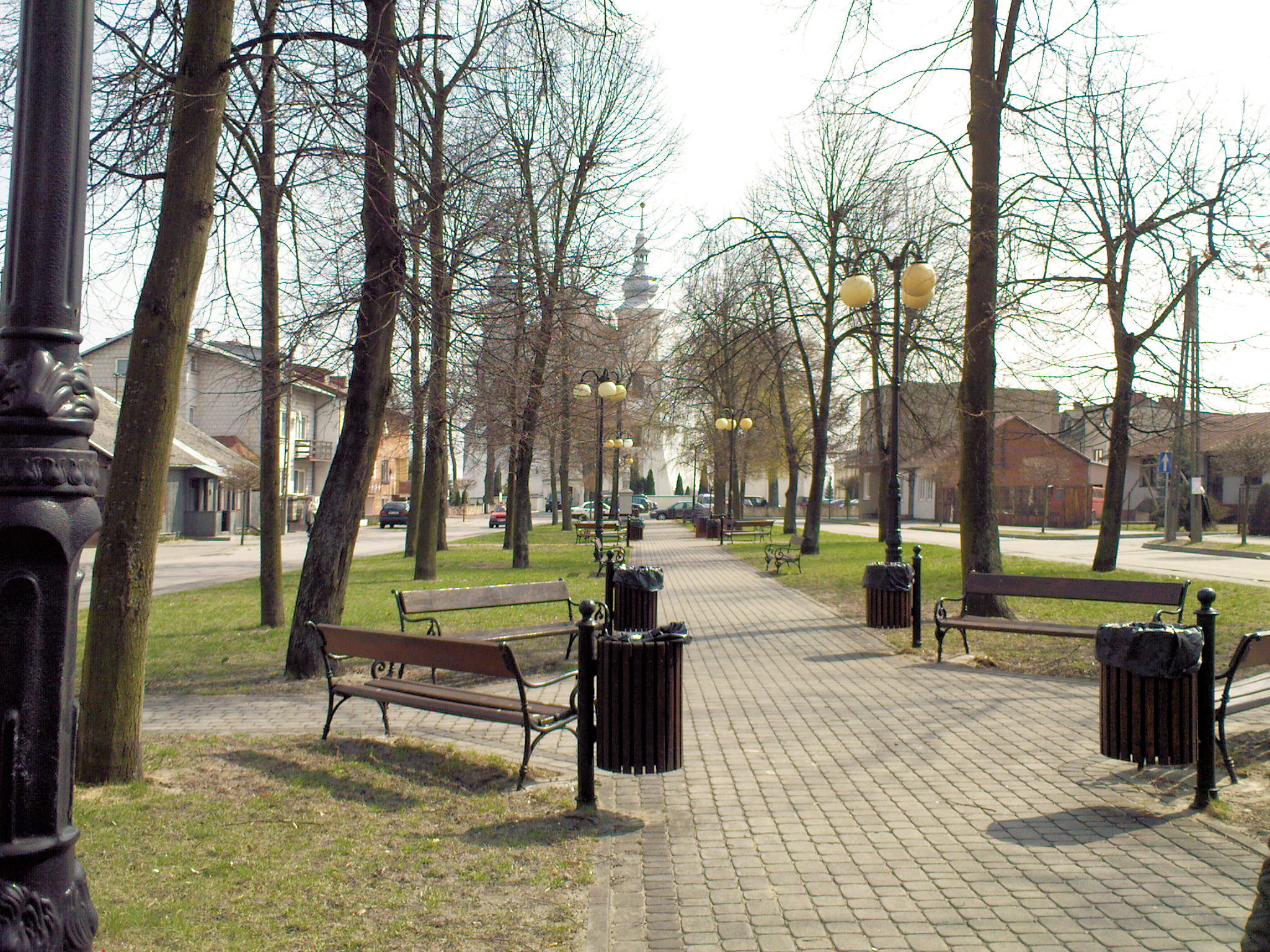 Jedlińsk - alejka prowadząca z rynku do kościoła